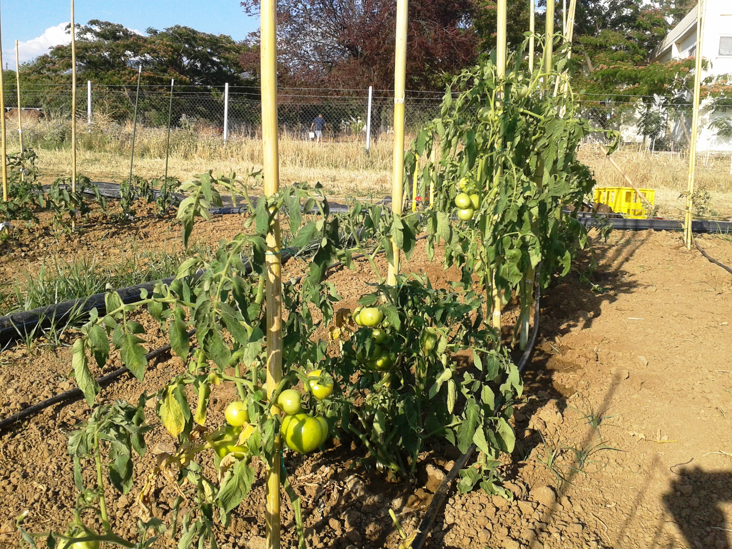 My tomato plants at Aristotl University of Thessaloniki, Greece